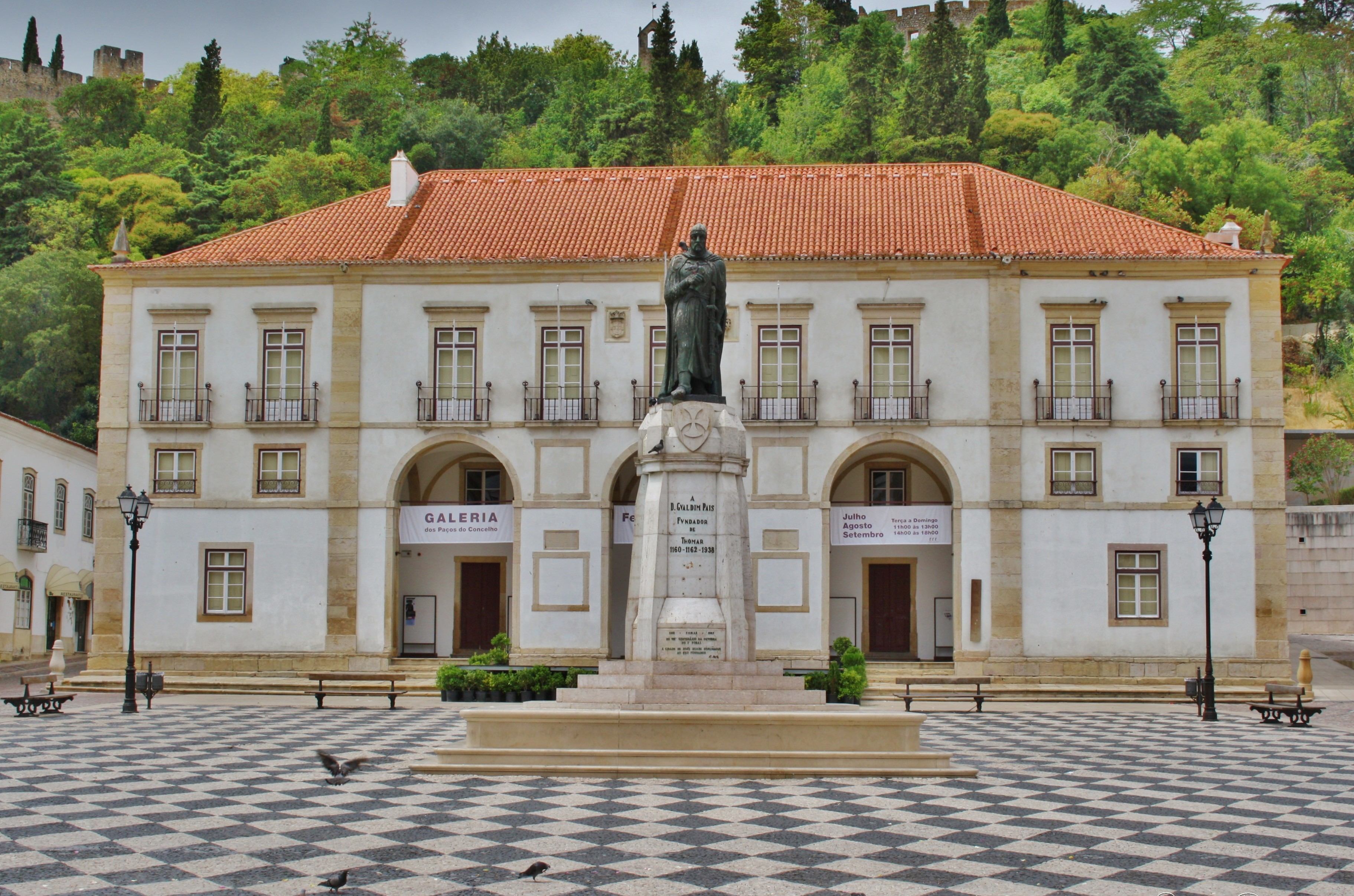 Monumento a Gualdim Pais em Tomar, Portugal This file was uploaded for Wiki Loves Monuments in Portugal with the unique identifier 72742.